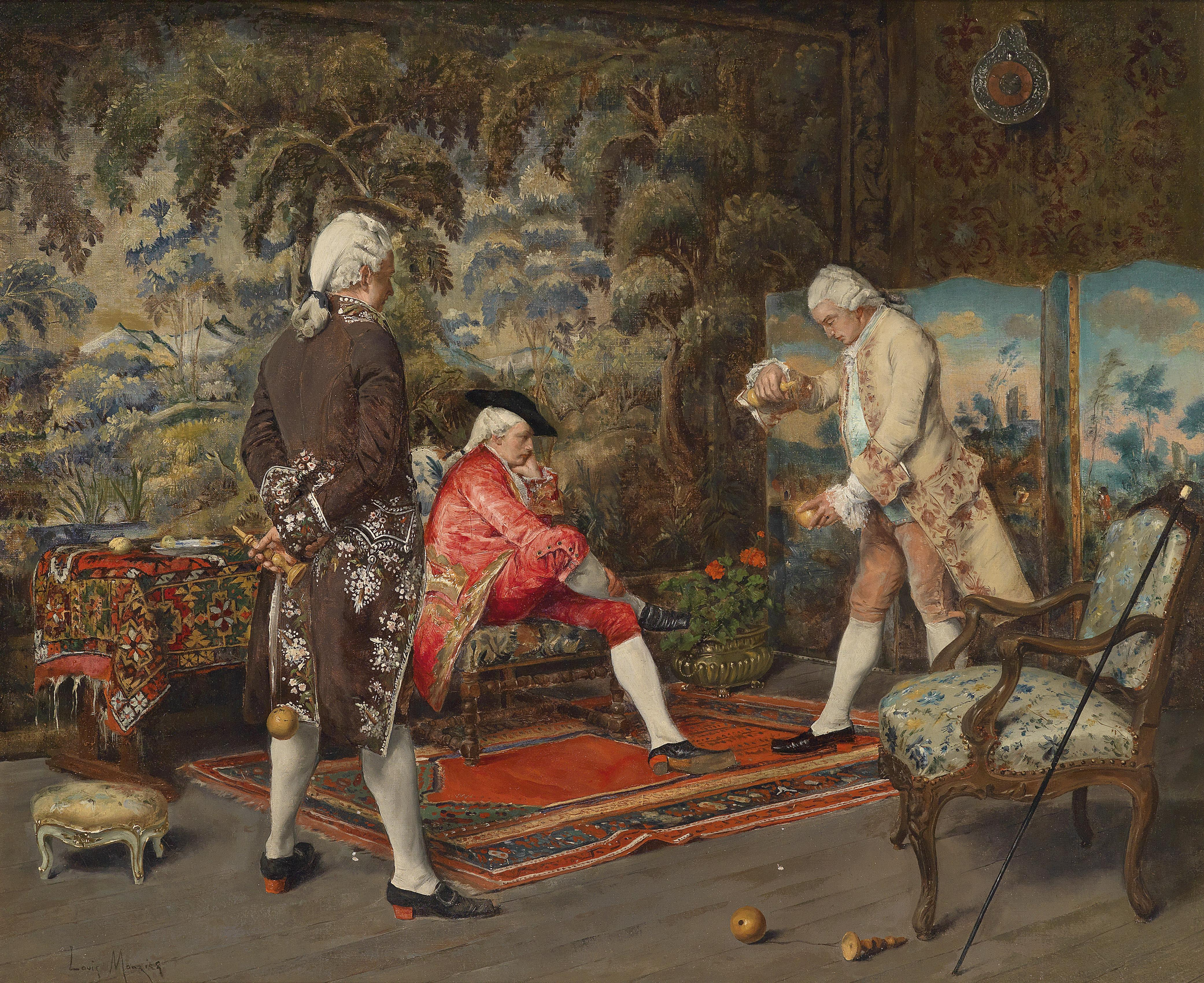 Die Bilboquet-Spieler, signiert Louis Monzies, Öl auf Leinwand, 53,5 x 65,5 cm